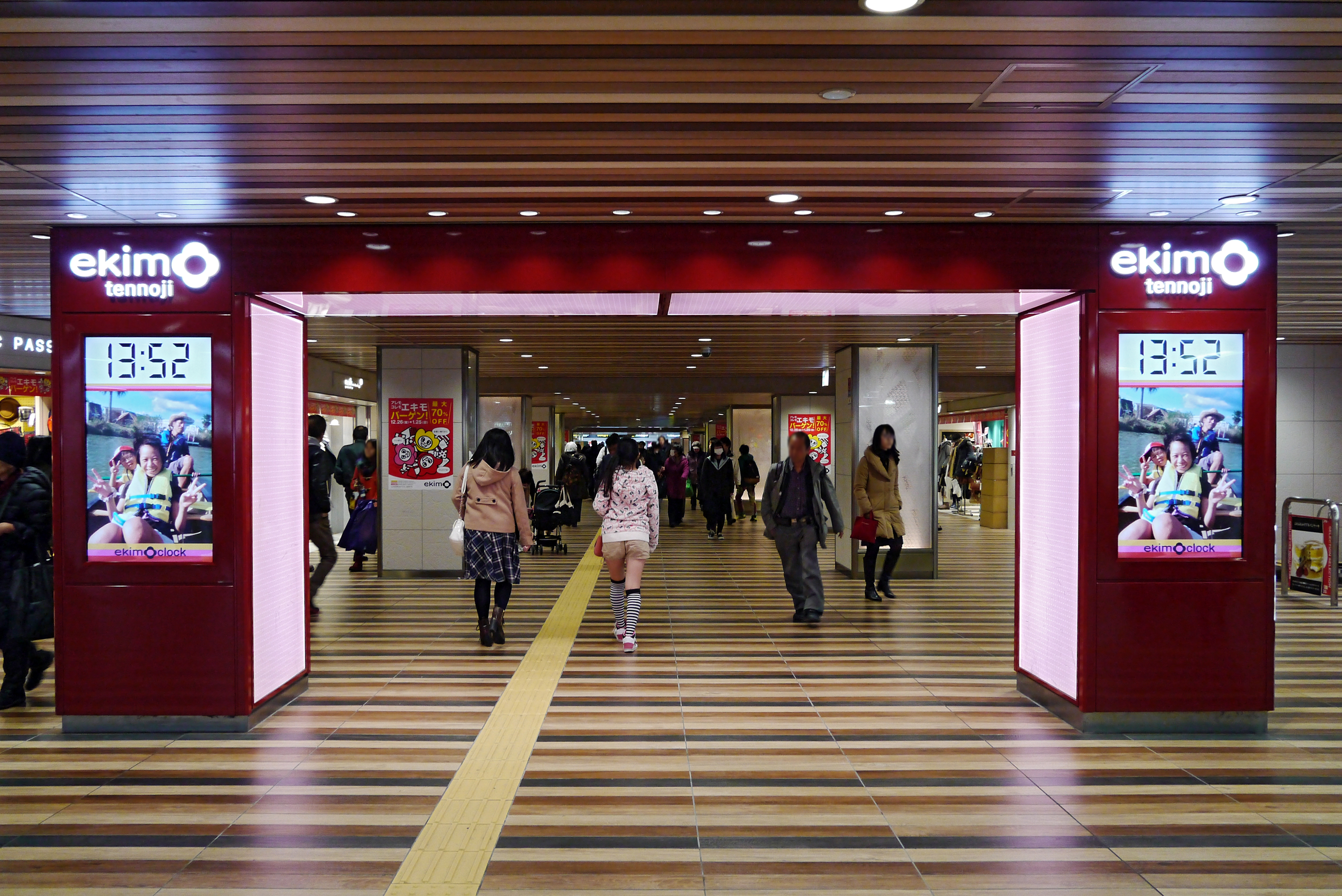 EKIMO (エキモ), Tennoji Station, Osaka, Osaka prefecture, Japan